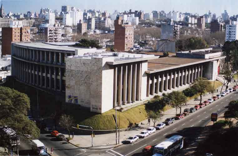 Facultad de Arquitectura. Ubicada en el departamento de Montevideo